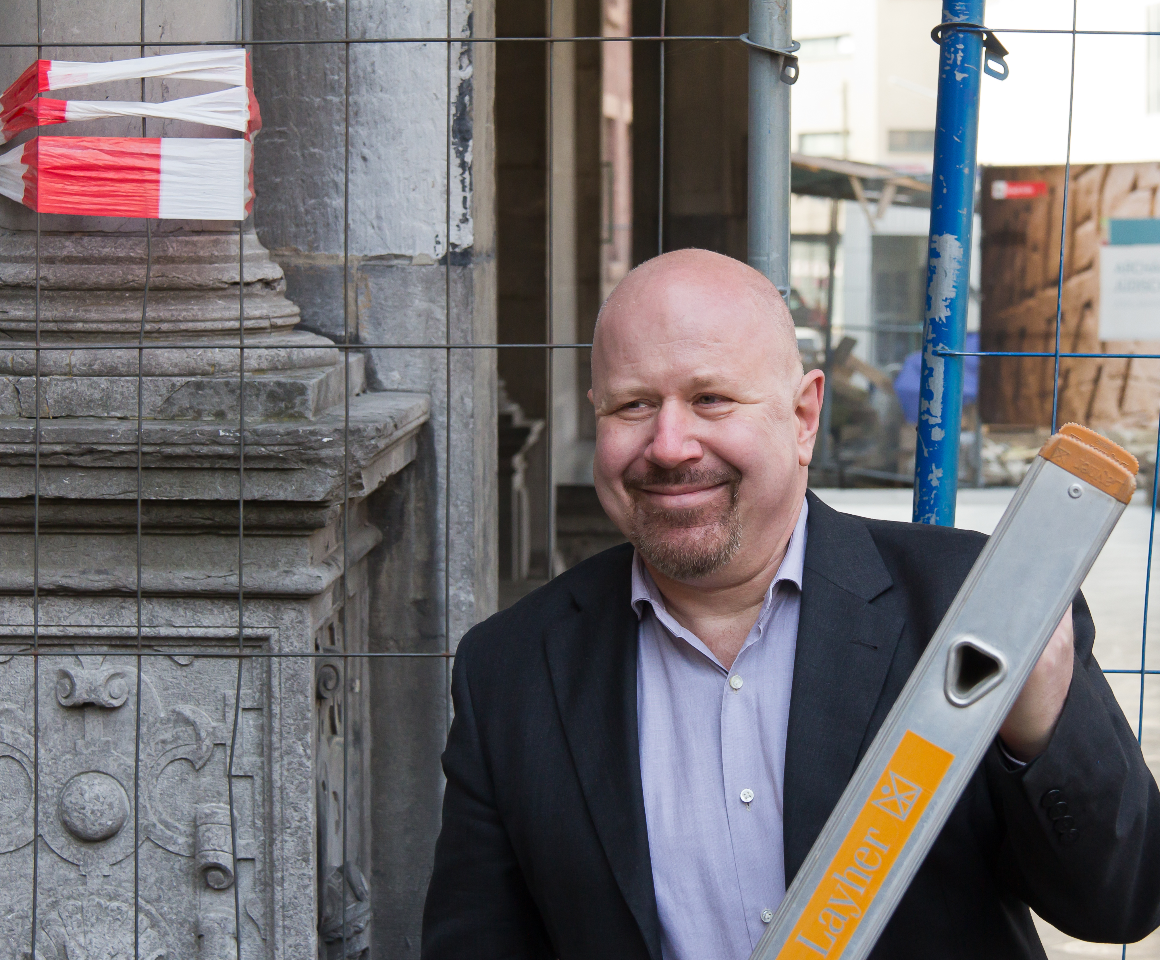 Pressekonferenz der Stadt Köln mit dem Archäologen Sven Schütte zur Entdeckung des Bodens des spätantiken Statthalterpalastes in Köln bei Grabungen zur archäologischen Zone. Im Zuge der Arbeiten zur archäologischen Zone / Jüdisches Museum ist bei Grabungsarbeiten an der nördlichen Seite der Renaissancelaube des historischen Rathauses von Köln zur Vorbereitung des Baus des neuen Museums der Boden des spätantiken Statthalterpalastes entdeckt worden. Hinter der Frontmauer zum Rhein ist in zwei Metern Tiefe der Fußboden der sogenannten „Porticus“ des Palastes aus dem vierten Jahrhundert entdeckt worden.